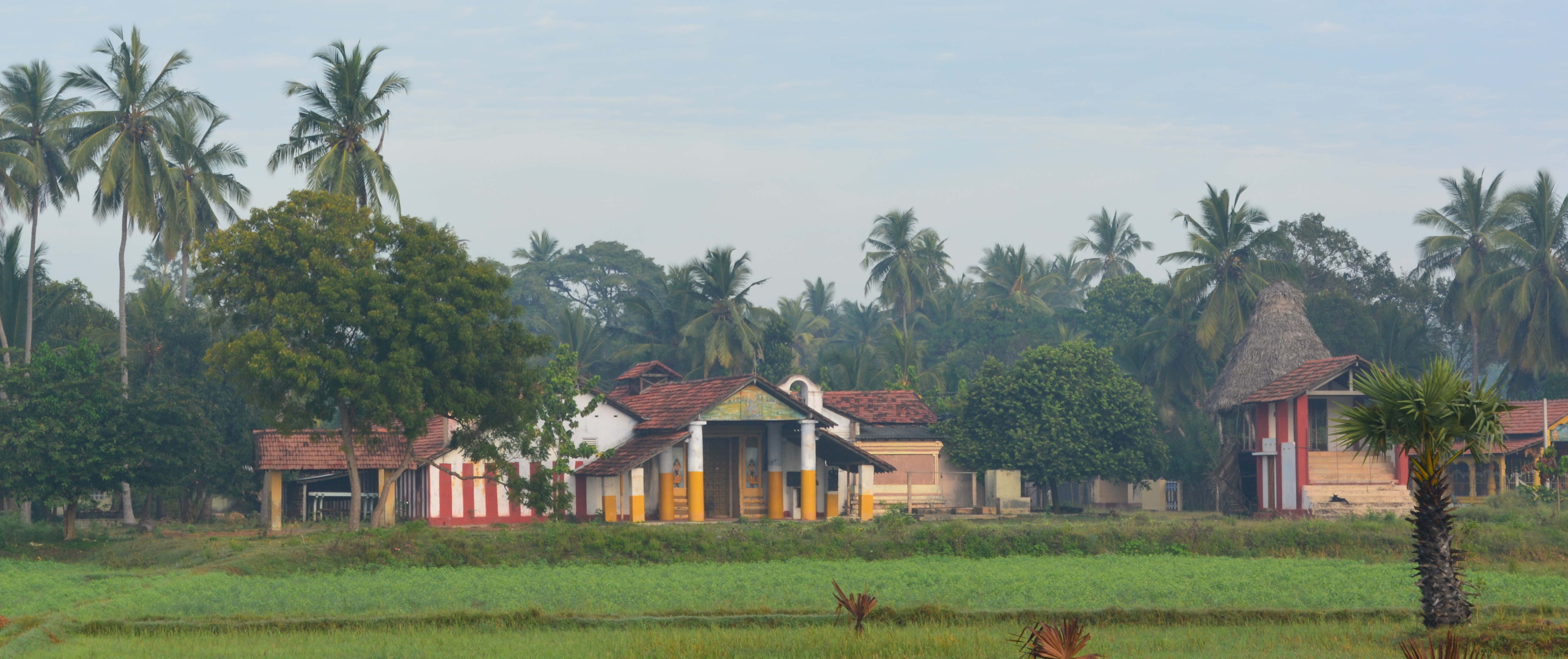 Perumaakadavai sri siththi vinayagar kovil